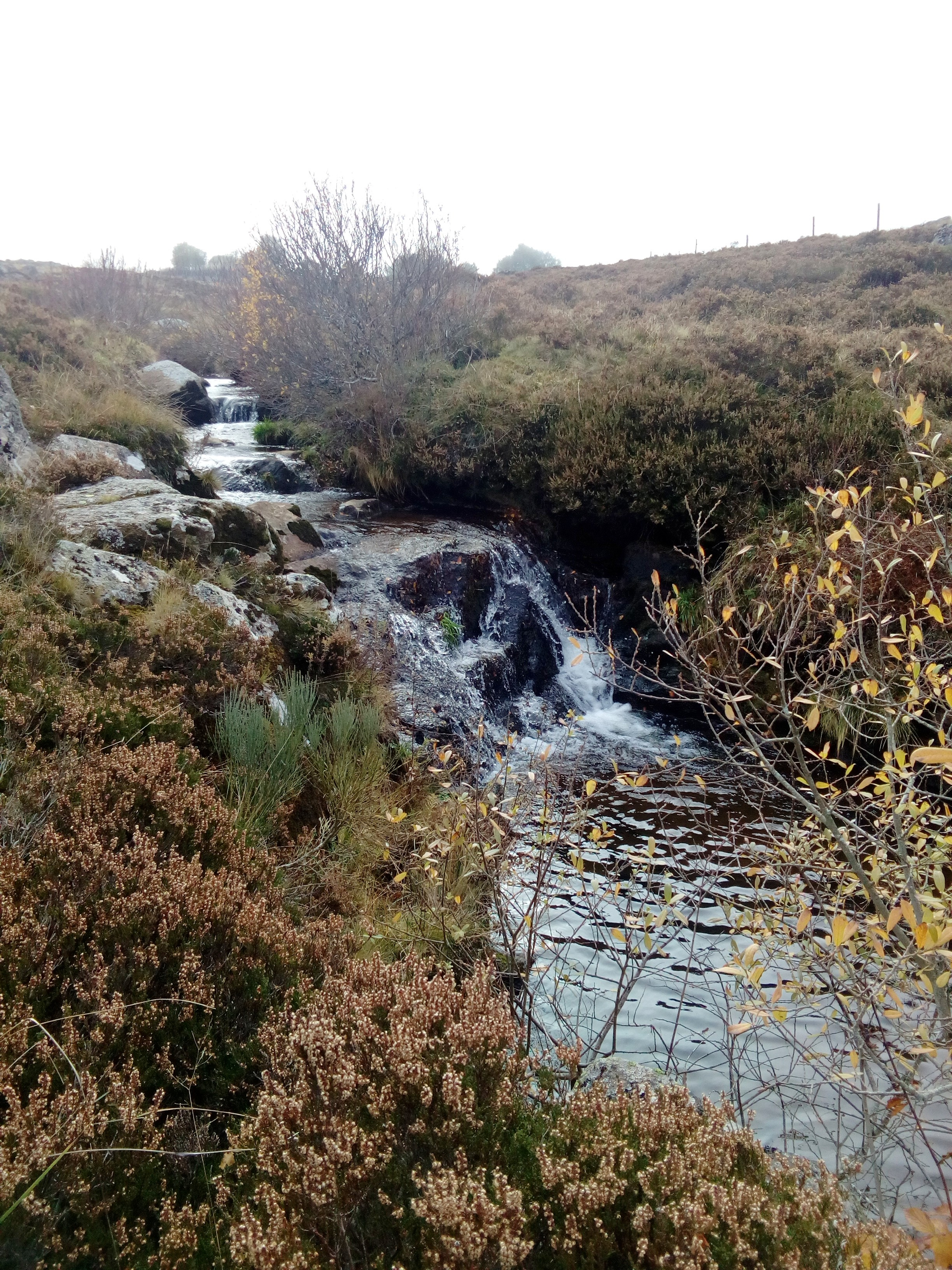 Le Bès (mont d'Aubrac, Lozère) non loin de sa source. La rivière n'est qu'un simple ruisseau qui serpente dans la lande (altitude environ 1270 mètres).